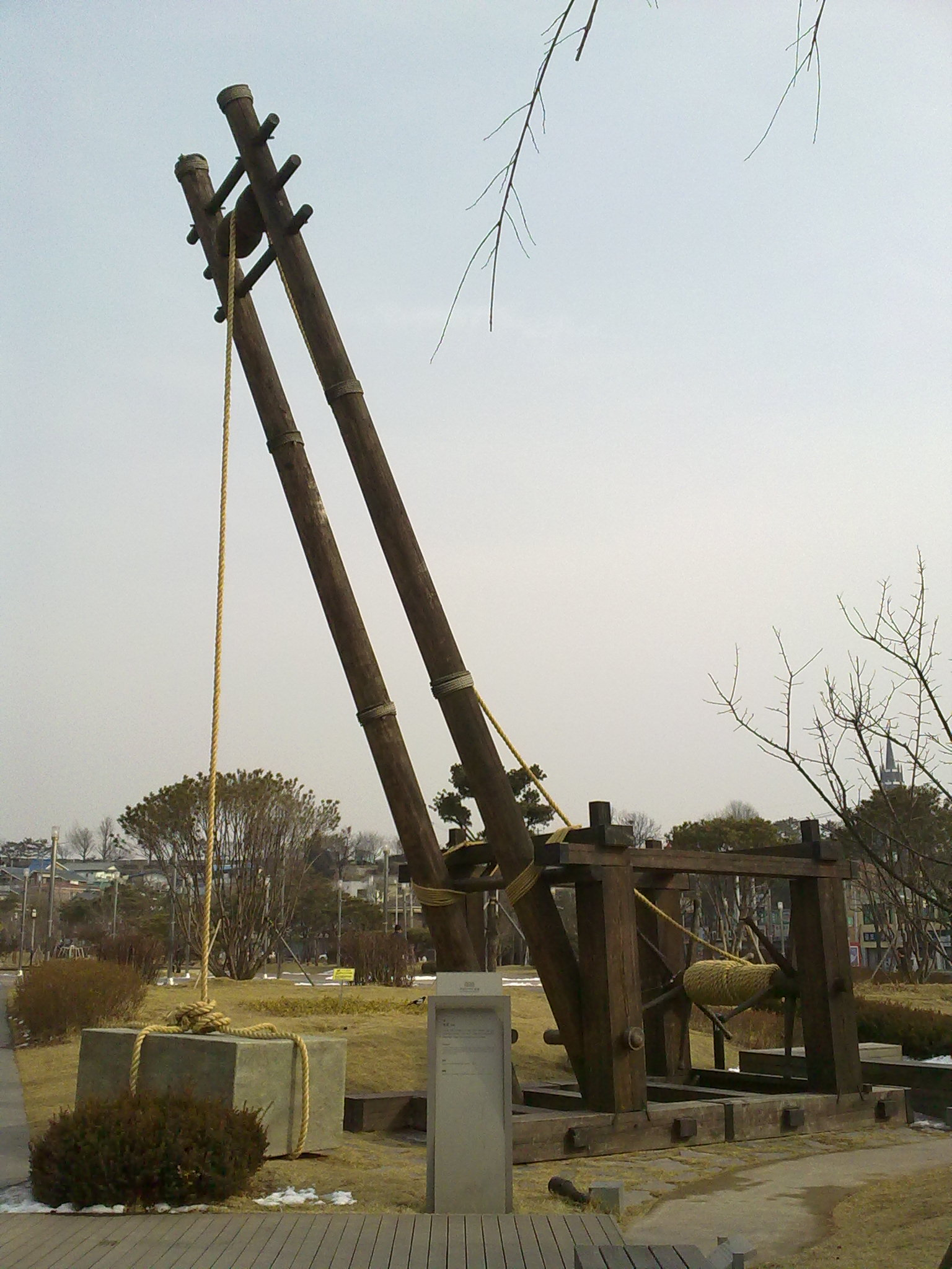 수원 화성 만들 때 쓴 녹로 (수원화성박물관 앞에 있는 것)